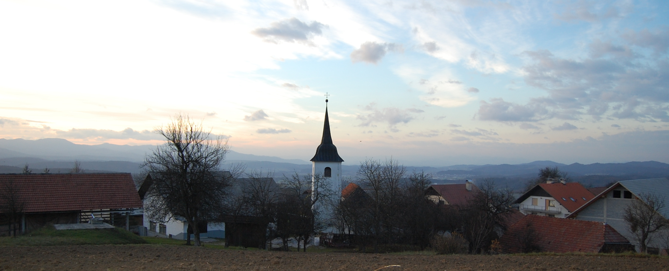 Nova vas, on Polževo in Slovenia